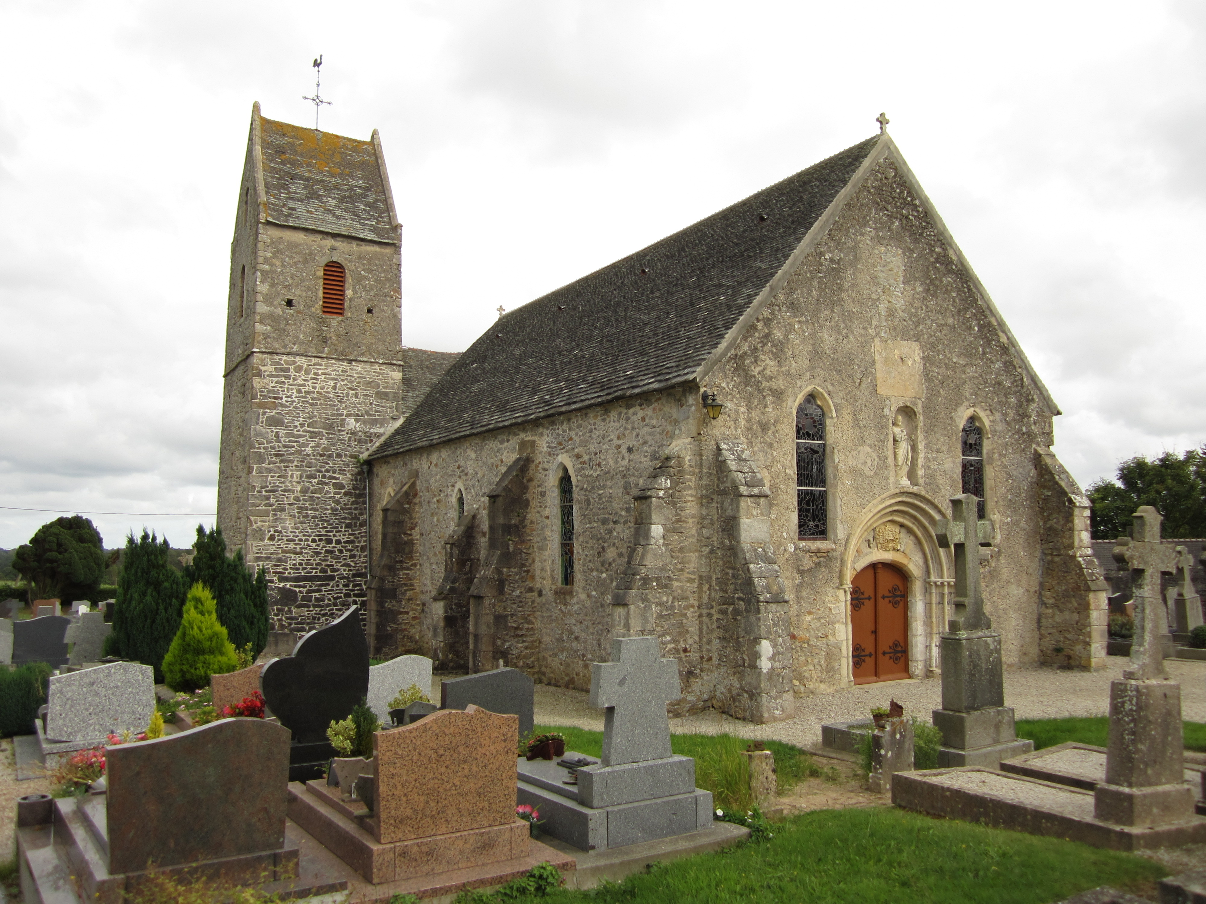 église Saint-Pierre de Sotteville